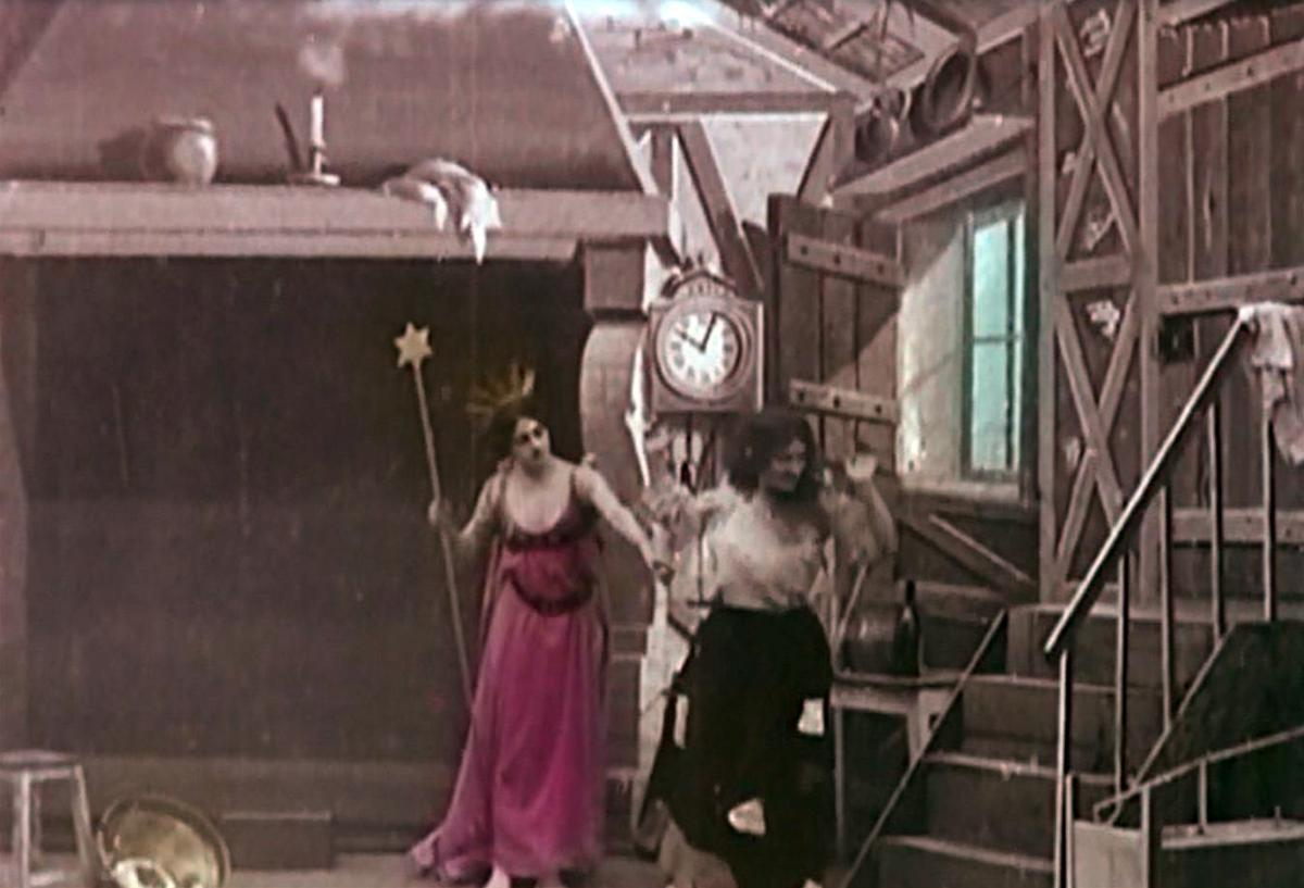 Image du film Cendrillon (1899) de George Méliès